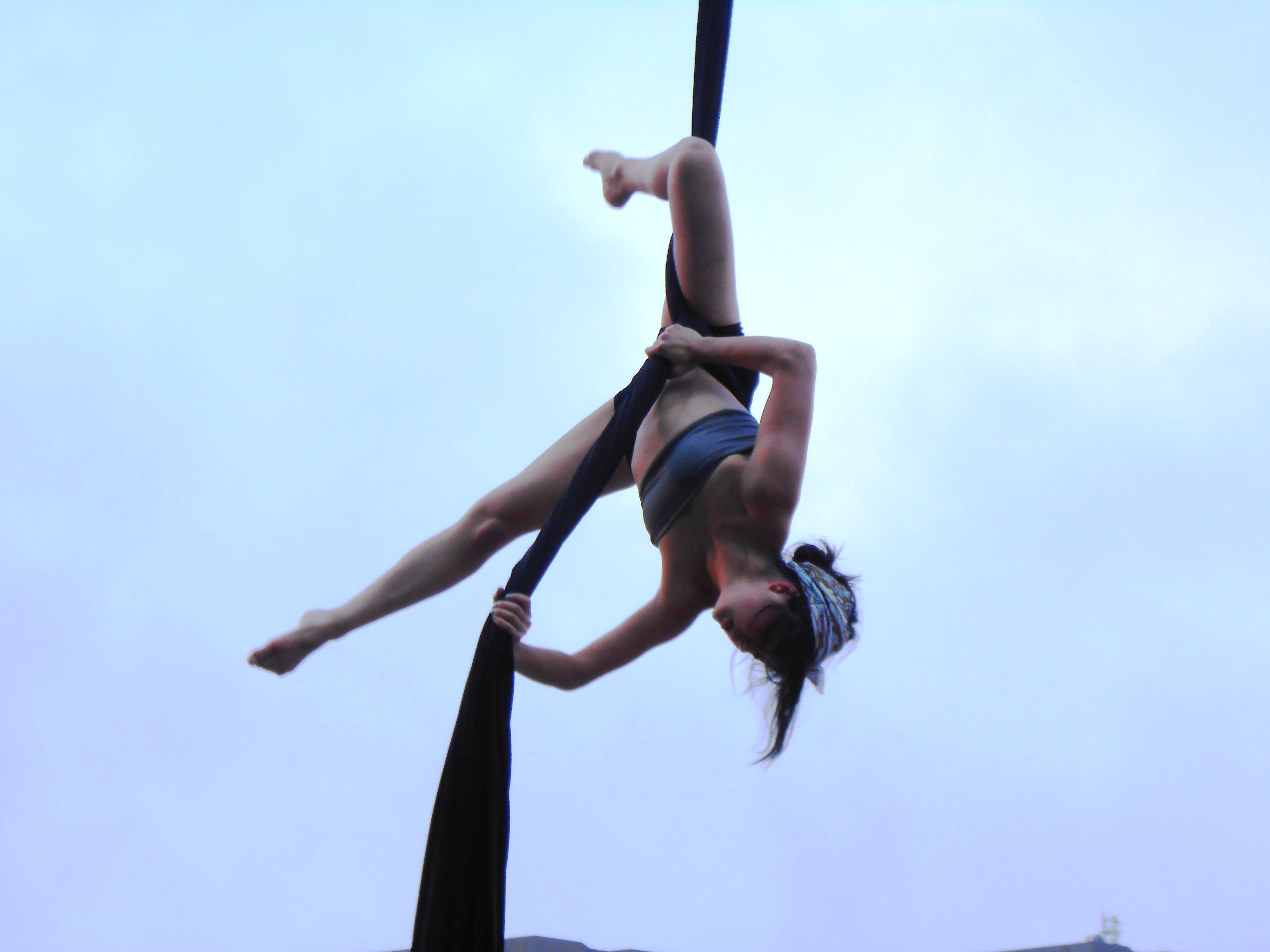 Pendant le Festival international de jazz de Montréal, un spectacle de haute voltige est offert par des étudiants de l'École nationale de cirque, à la promenade des Artistes.